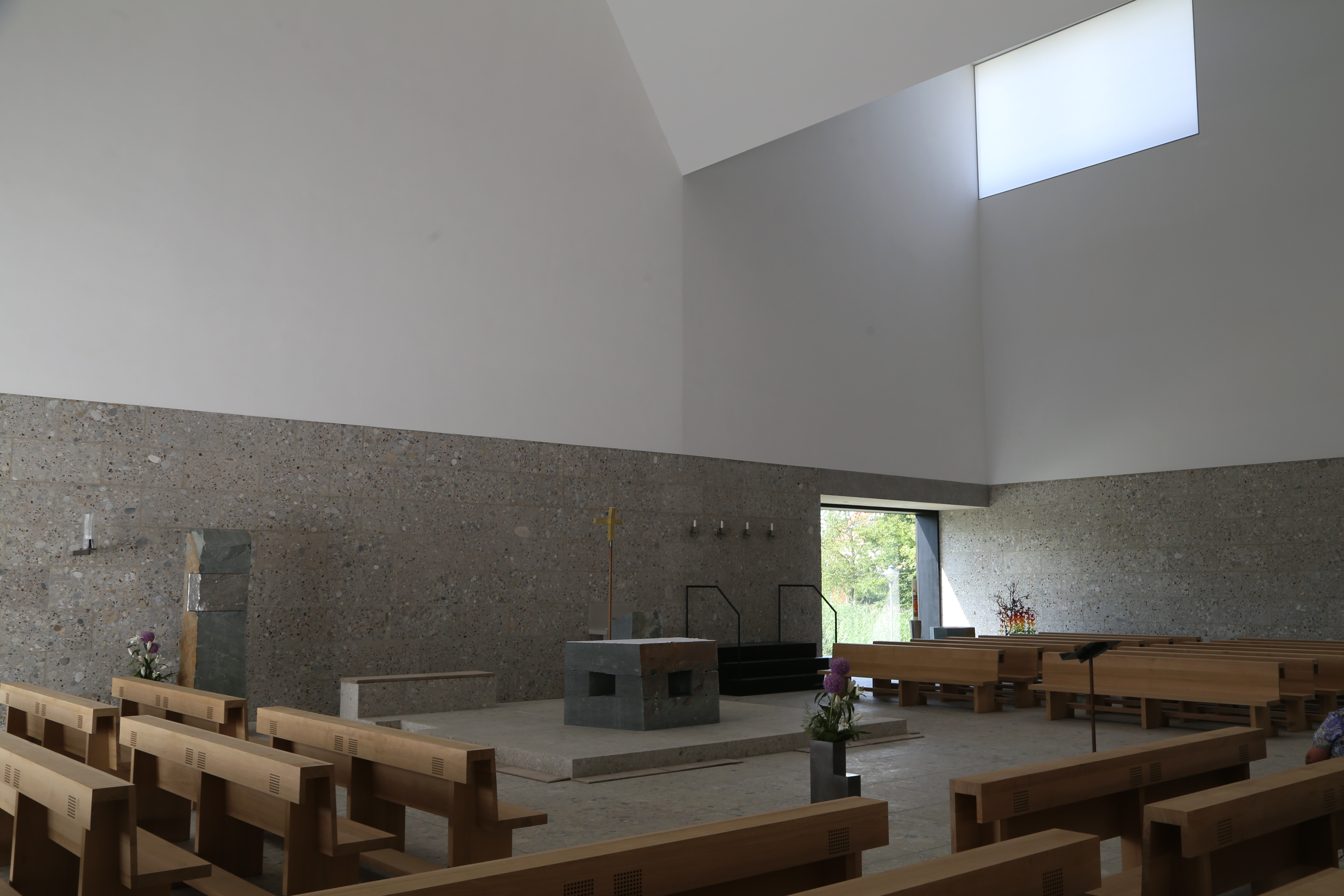 Pfarrkirche Seliger Pater Rupert Mayer, Poing; Architekt: Andreas Meck